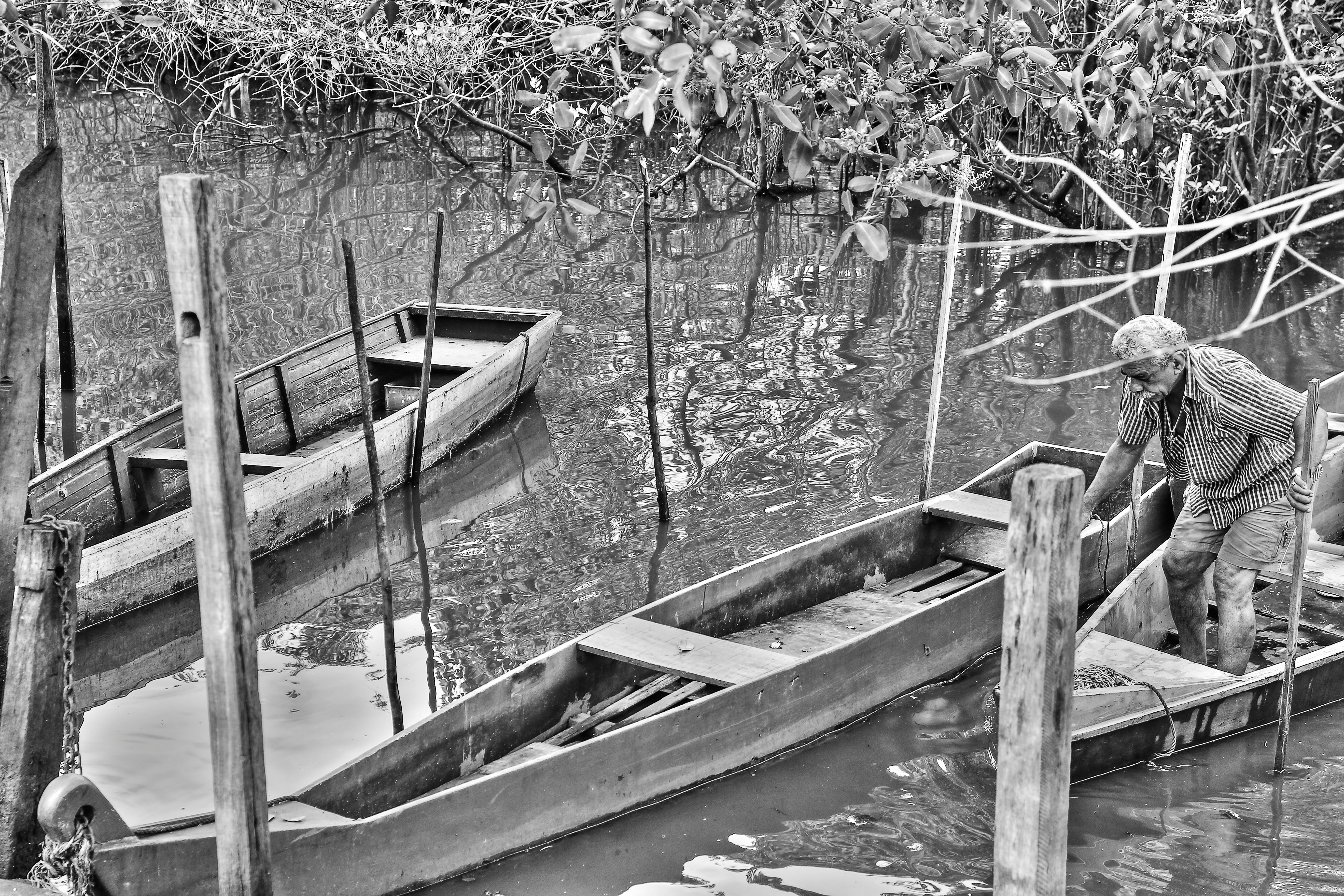 mangue